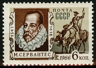 марка